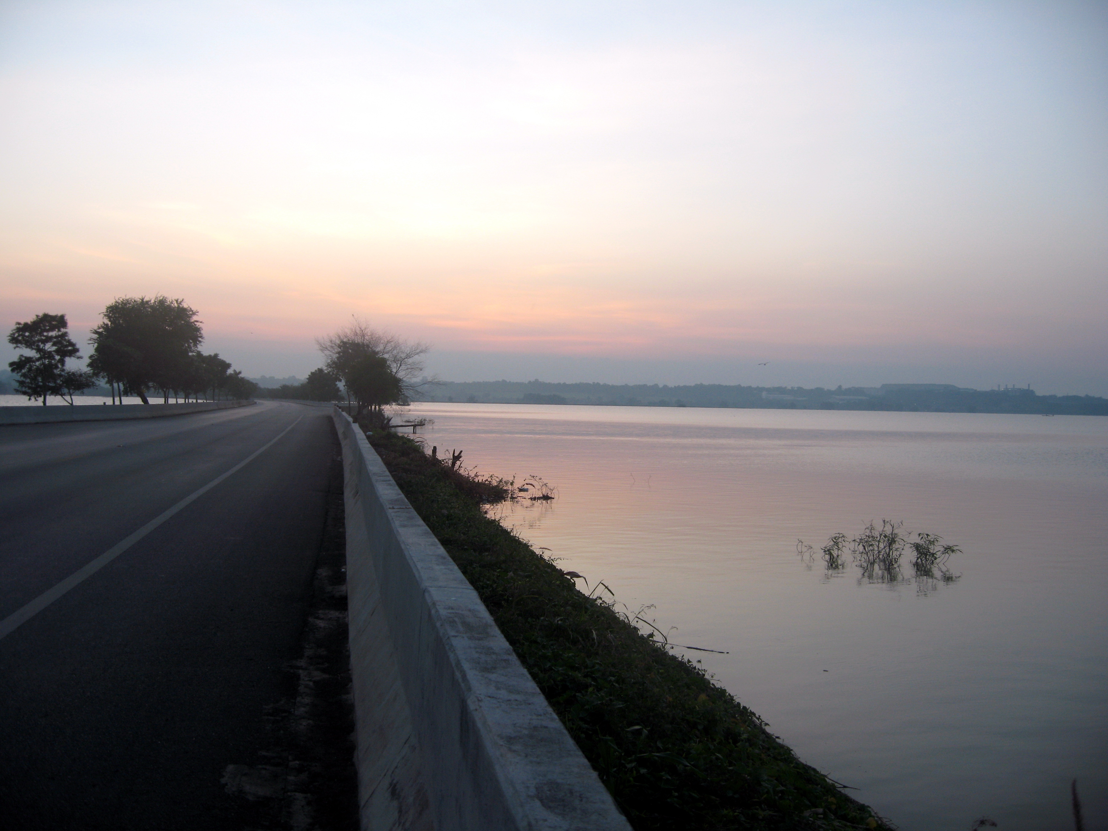 ถนนกลางน้ำเหนือเขื่อนป่าสักชลสิทธ์